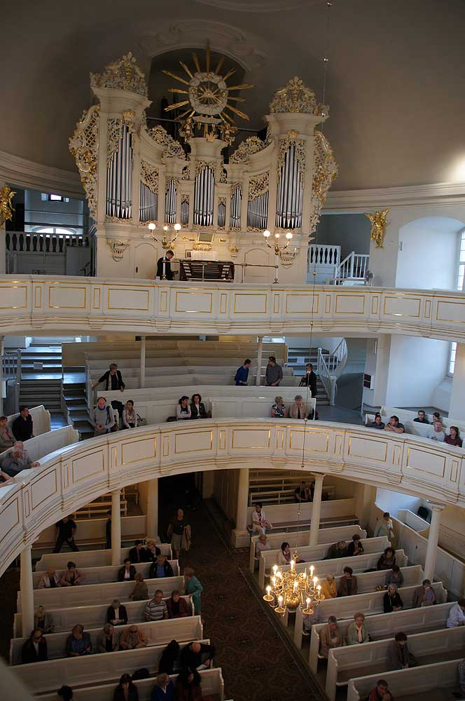 Kościół parafialny Opatrzności Bożej – zwany Dworskim (ewangelicki) Kazimierza Wielkiego 29, Miasto Wrocław - Stare Miasto